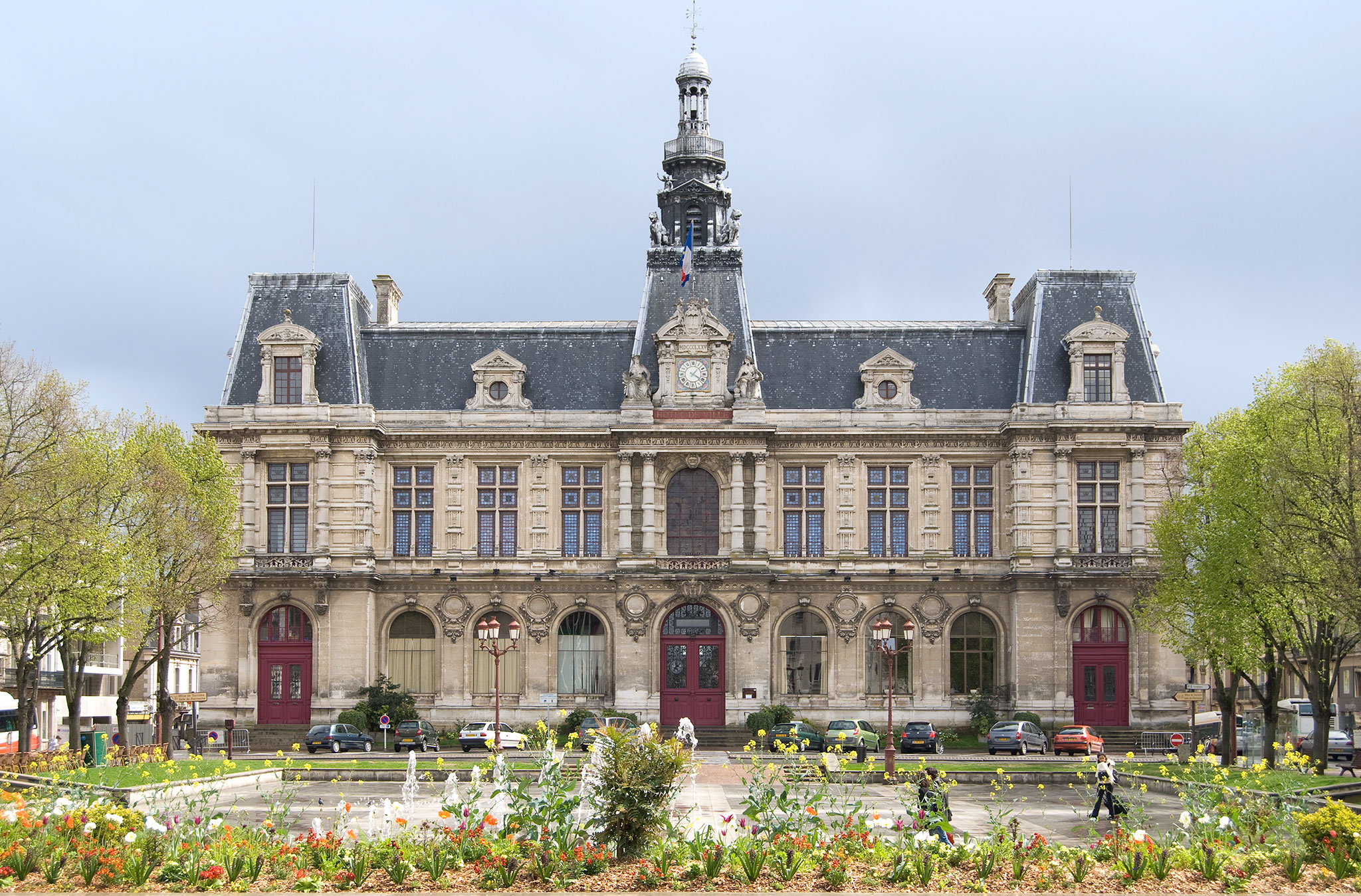 Mairie de la ville de Poitiers, France